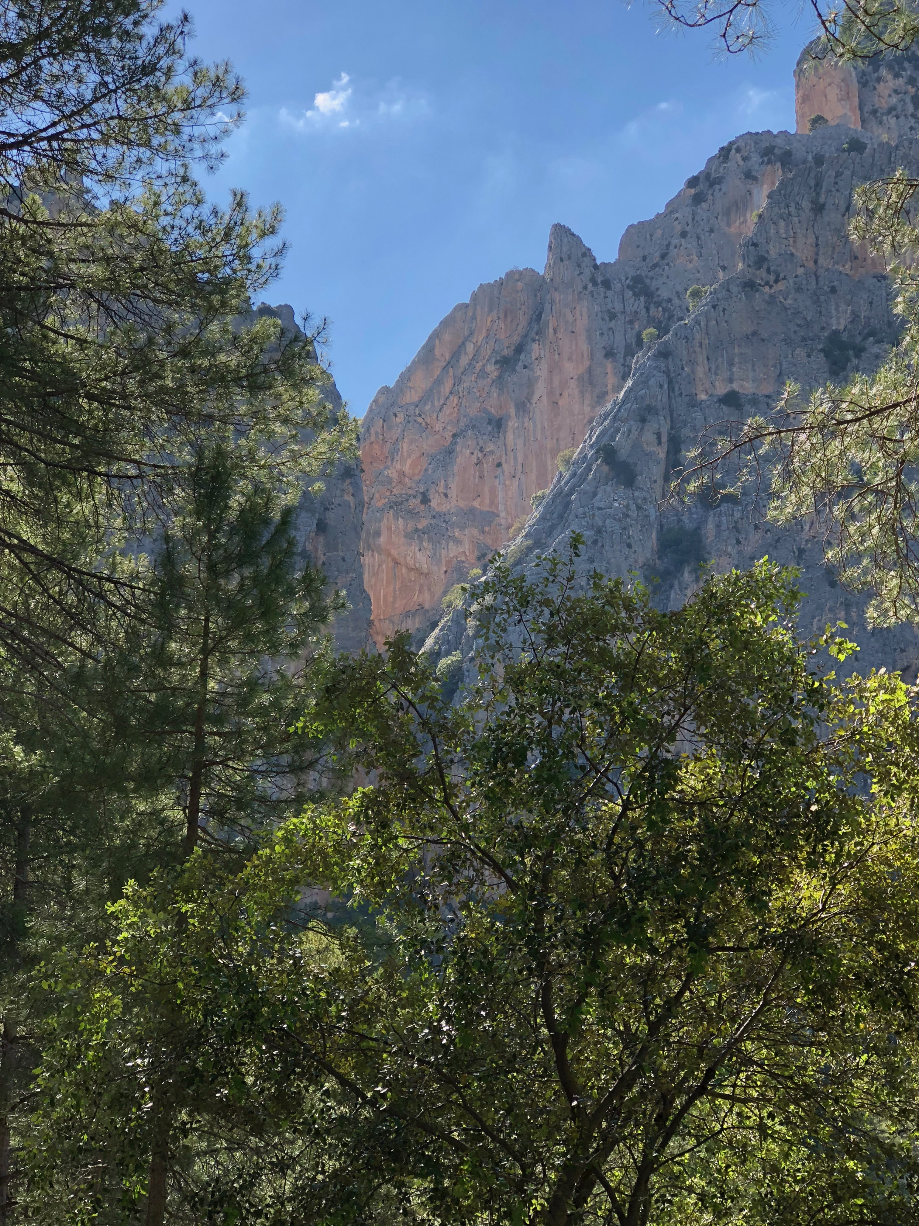 Sierra de Castril, España